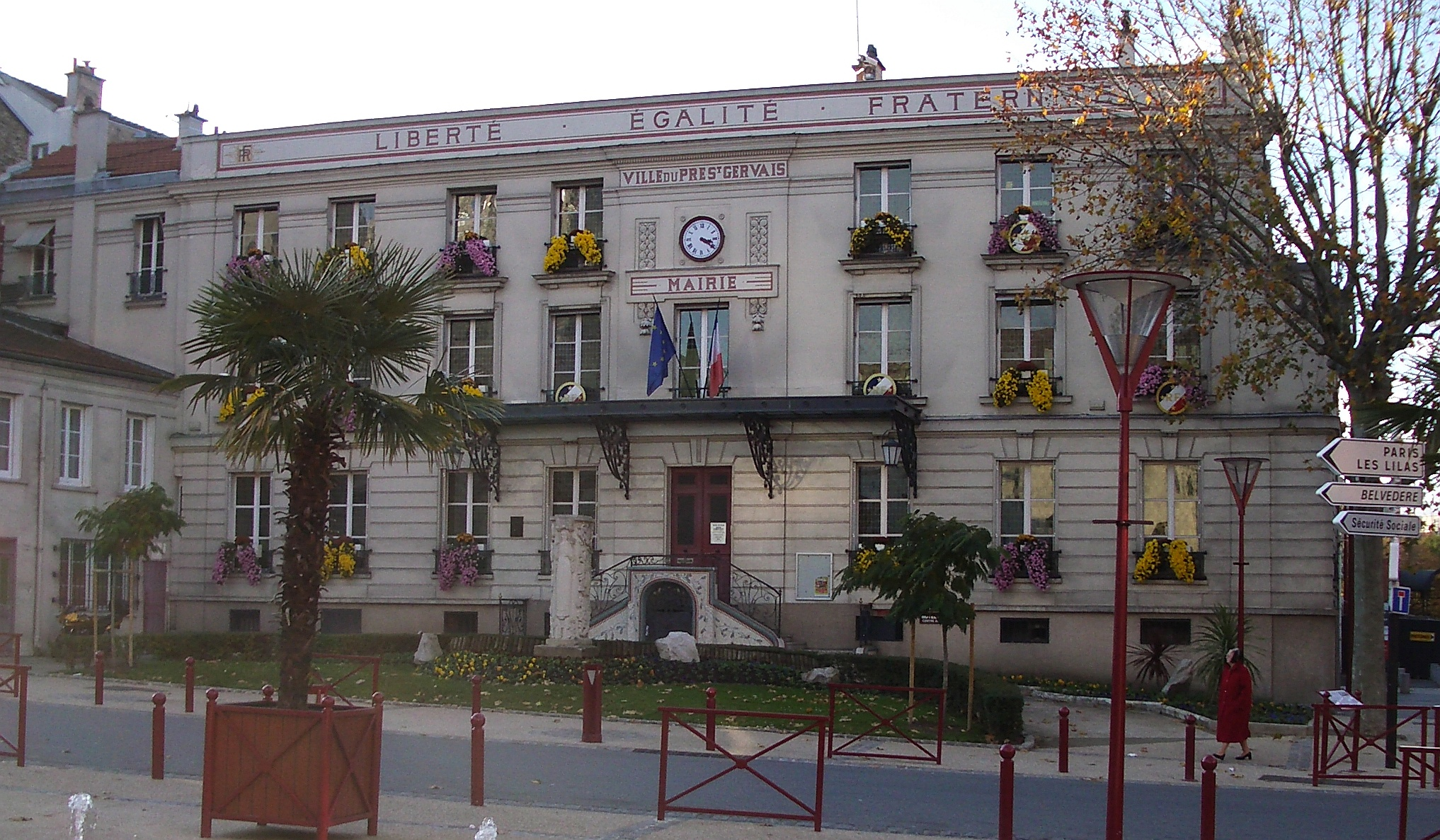 La mairie du Pré Saint-Gervais, ville française.